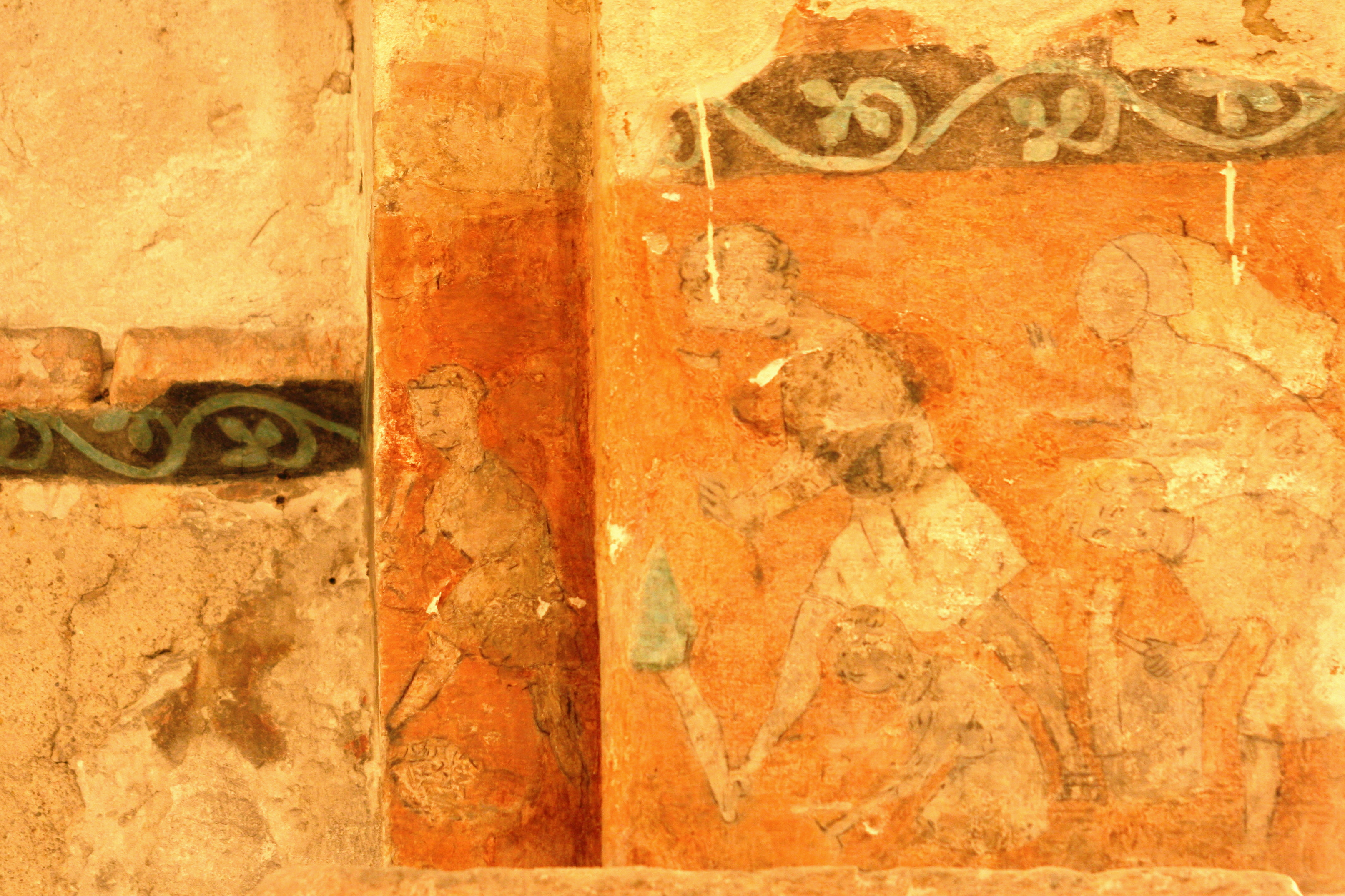 Reste de peinture murale du XIIIe siècle se trouvant dans les cryptes de l'abbaye de Saint-Victor. Elle représente les corps de métier travaillant à l'achèvement de l'église.